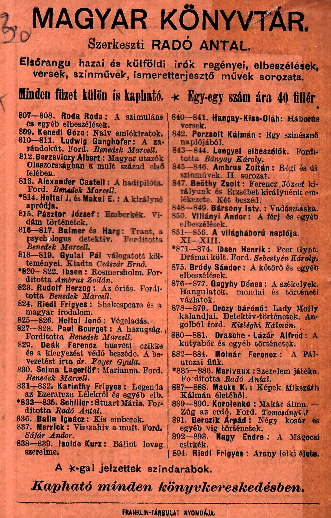 A "Magyar könyvtár" című könyvsorozat reklámja (Riedl Frigyes [1856-1921] Arany lelki élete című művének hátlapja)